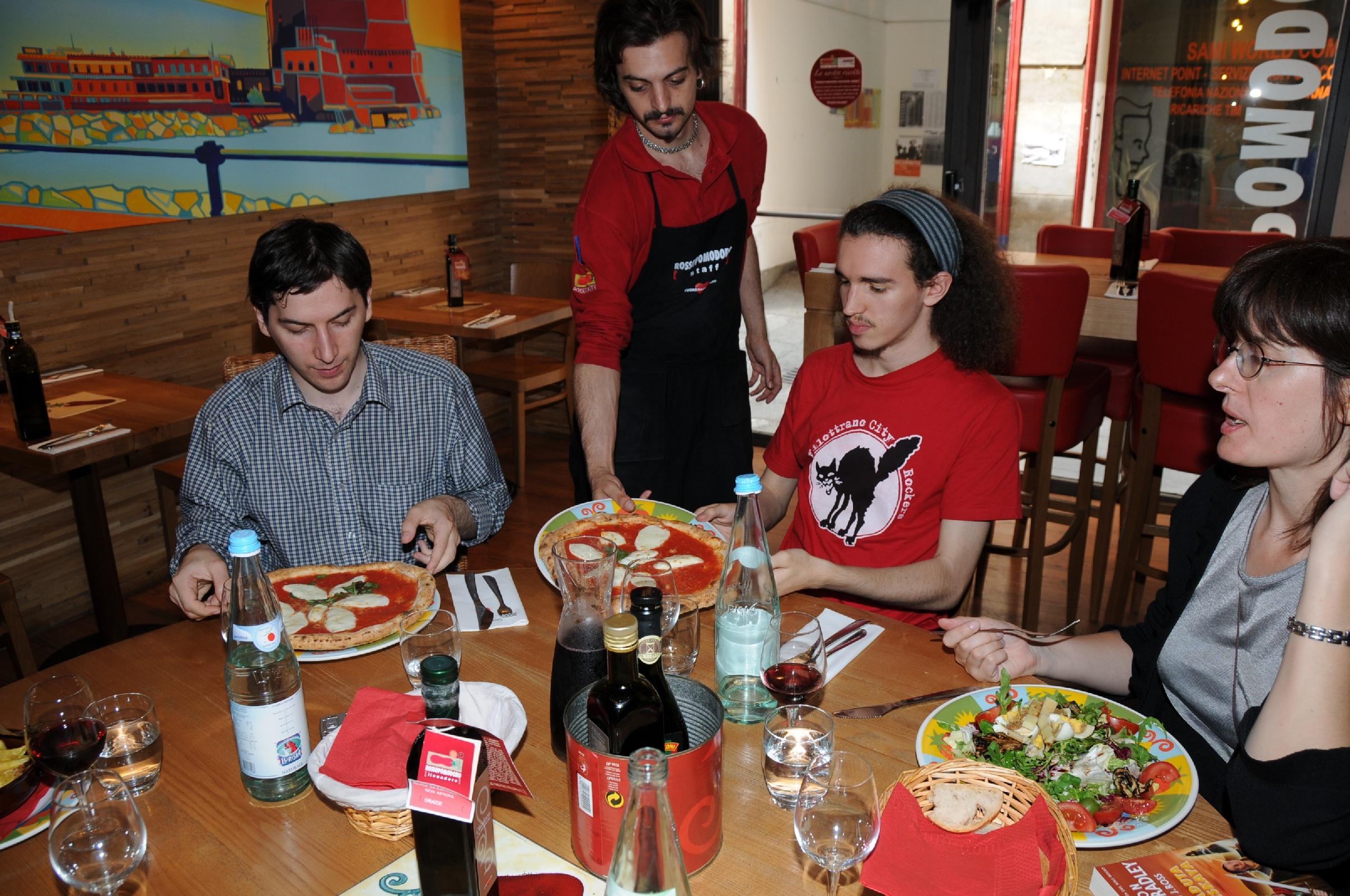 Biografilm 2008 - Bologna Contents 1 source 2 date 3 author 4 permission 5 Licensing 6 Original upload log source Self made date 16 giugno 2008 author Utente:Cassinam permission Categoria:Biografilm2008